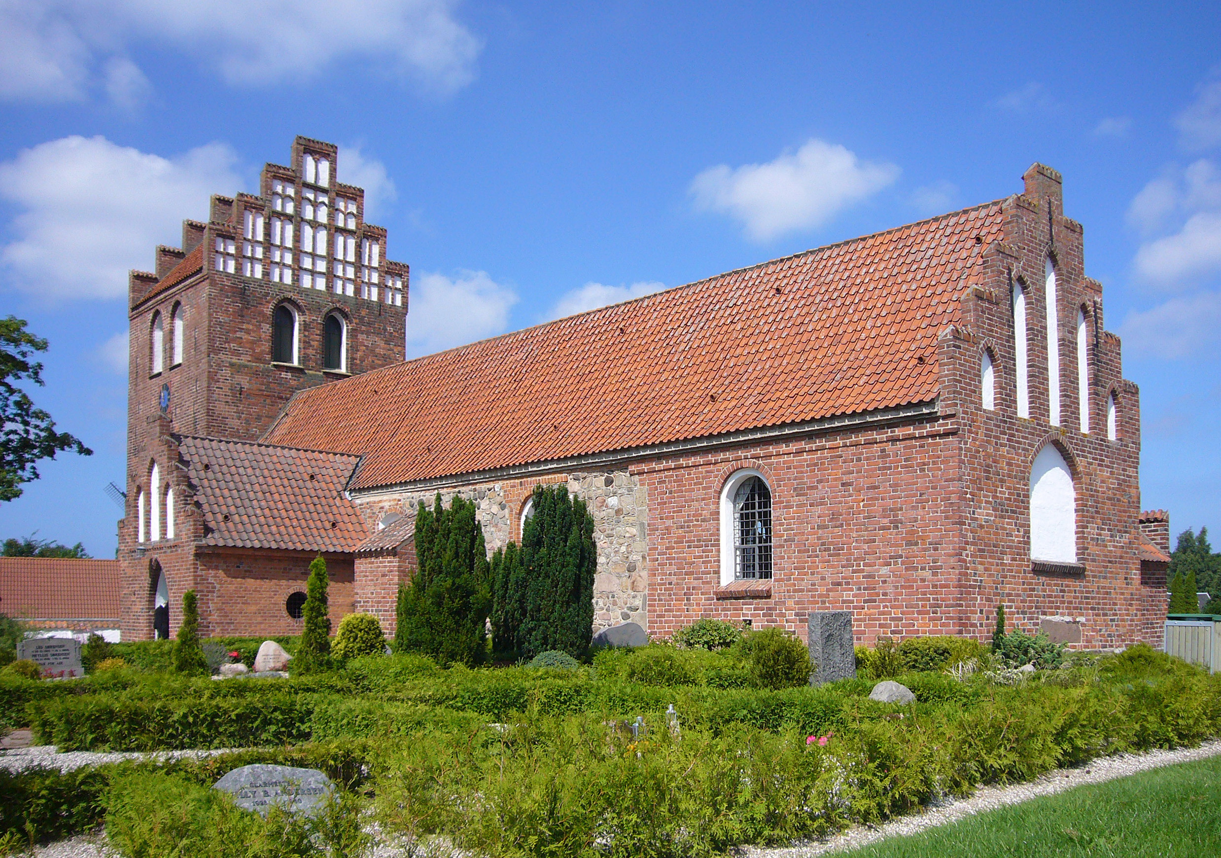 Melby Kirke, Frederiksværk, Denmark. Melby Kirke